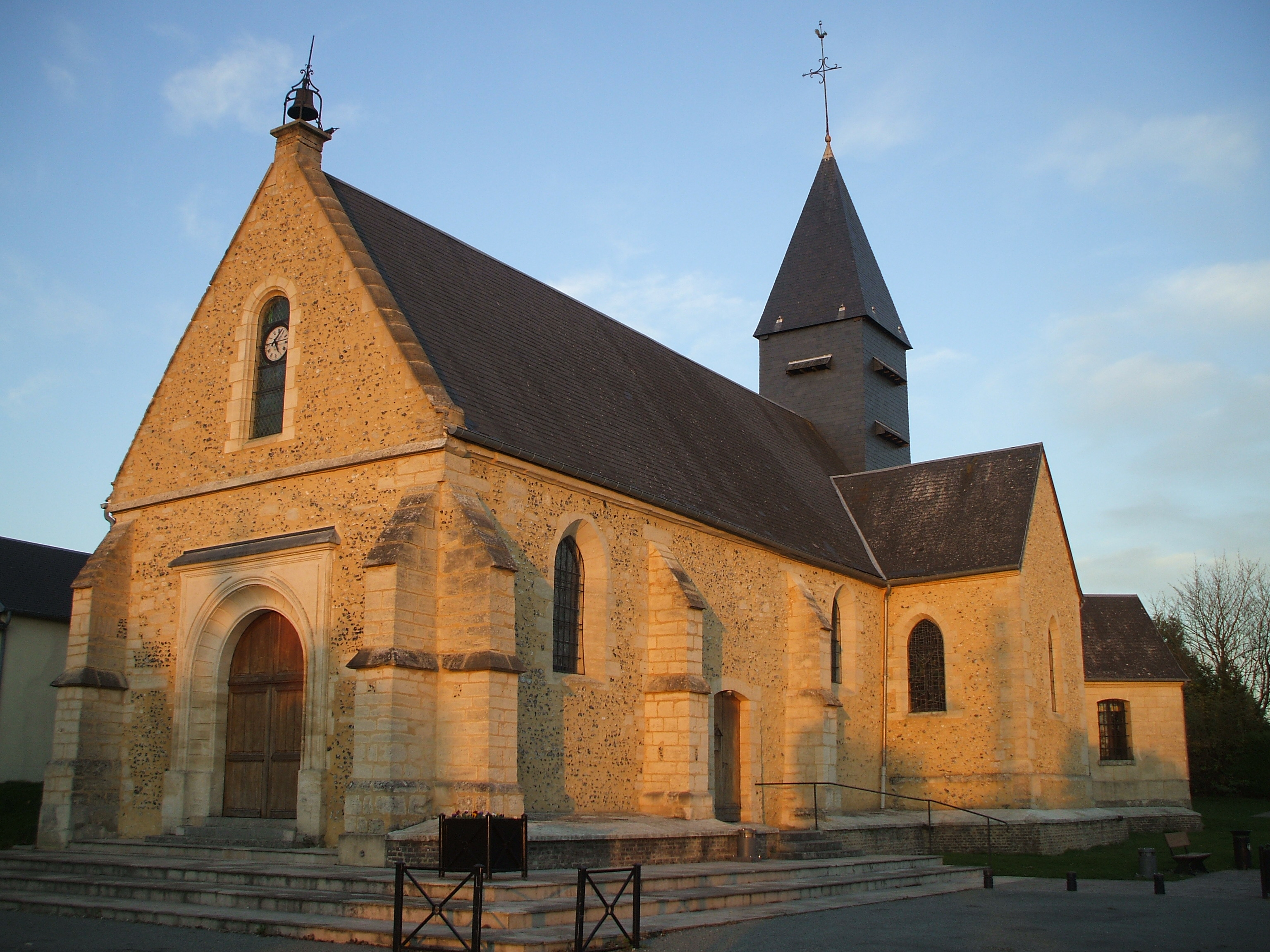 église de Laboissière-en-Thelle (Oise, France)